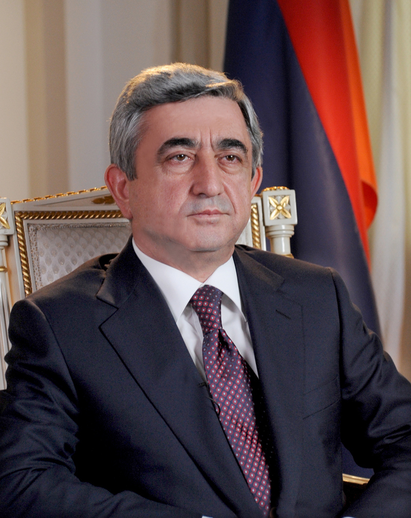 Президент Армении Серж Саргсян